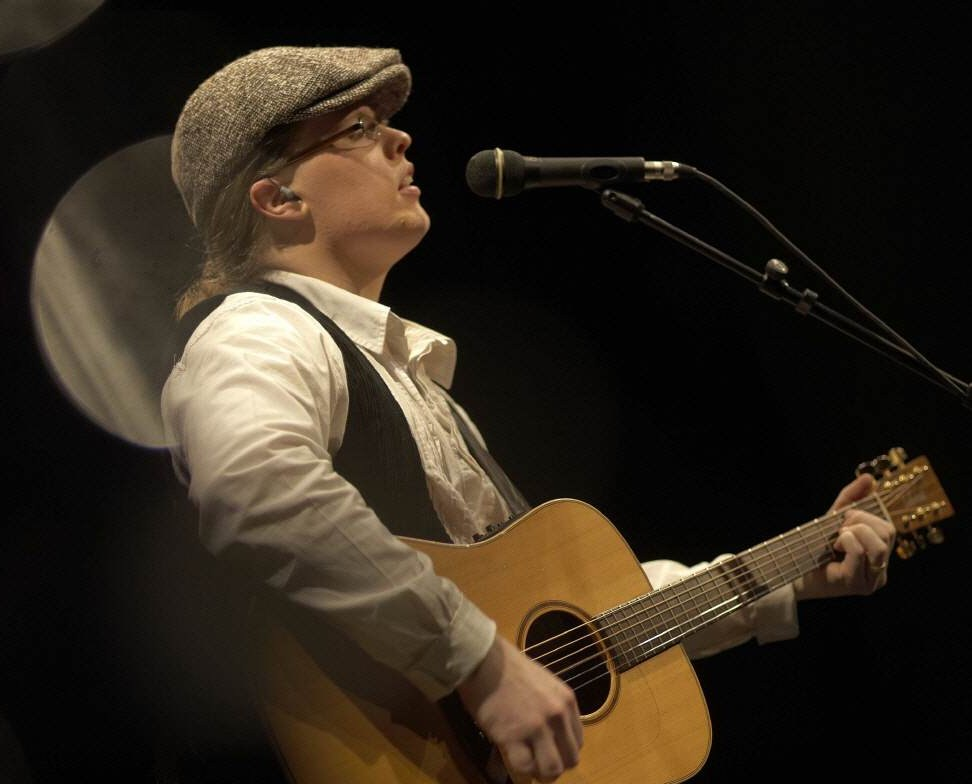 Angelo Kelly en un concierto en Madrid 7 de noviembre de 2009